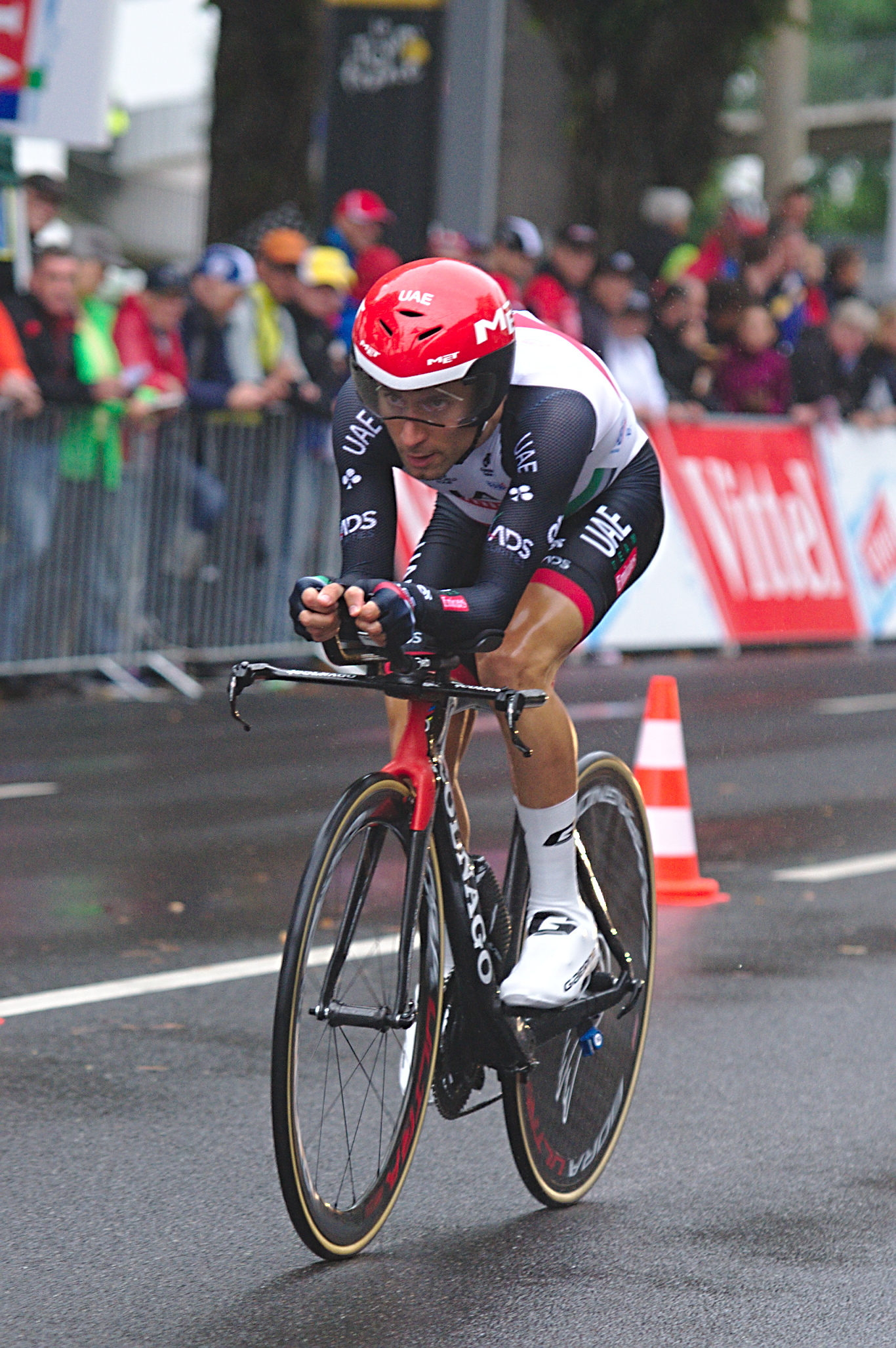 Einzelzeitfahren beim Grand Départ in Düsseldorf, Tour de France 2017: Diego Ulissi (UAE Team Emirates)